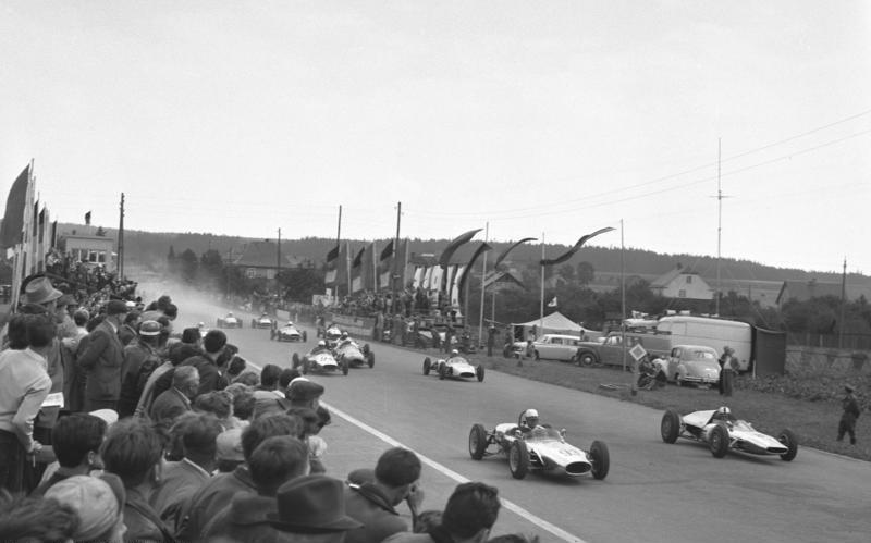 Zentralbild Schaar 14.7.1963 15 Staaten auf dem Schleizer Dreieck am 14.7.63 Zum 30. Male donnerten am Sonntag auf dem Schleizer Dreieck die Motoren. Die älteste Rennstrecke Deutschlands sah an diesem Tag Fahrer aus 15 Ländern am Ablauf und hatte damit ein Rekordergebnis zu verzeichnen. Gleichzeitig stellte das Rennen einen Höhepunkt in der Vorbereitung des in drei Wochen in Leipzig stattfindenden IV. Deutschen Turn- und Sportfestes dar. UBz: Mit großer Begeisterung verfolgen die Zuschauer das Feld der Formel-Junior-Wagen.